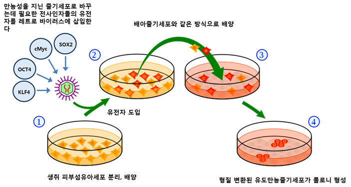 일본 교토대 야마나카 신야 교수팀은 레트로바이러스(retrovirus)를 이용하여 생쥐의 피부 섬유아세포에 Oct3/4, Sox2, c-Myc, Klf4 유전자를 도입시켜 유도만능줄기세포를 만들었다.